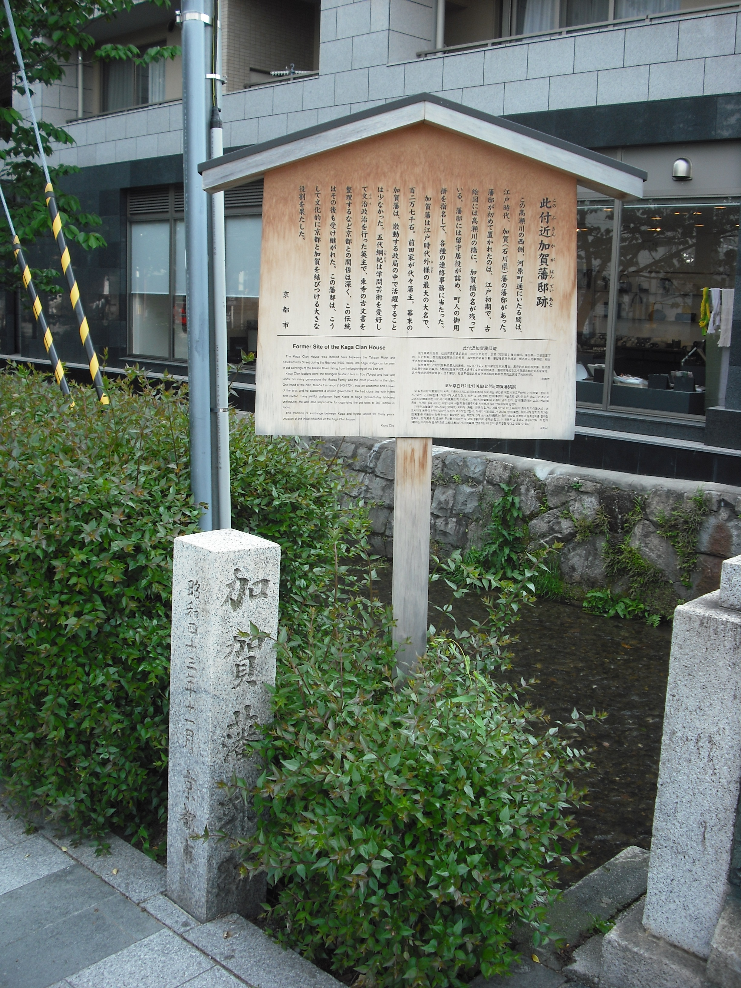 京都の加賀藩邸跡